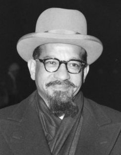 Aankomst van de oppositieleider van Curacao dr. mr. Da Costa Gomez op Schiphol